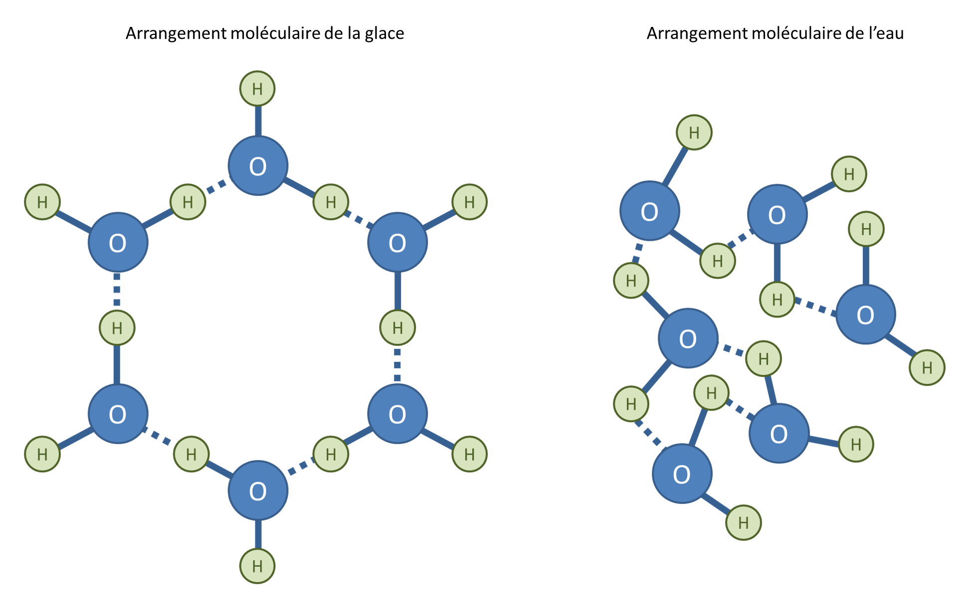 Arrangement cristallin de l'eau